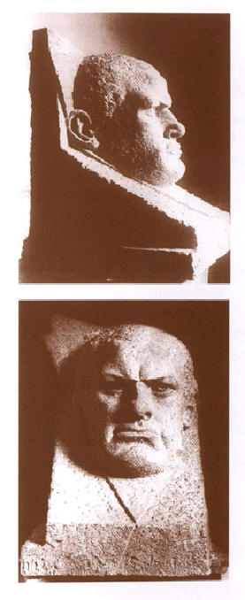 Maria Denissova-Chtchadenko. Le poète (Vladimir Maïakovski, 1925-27). Ciment